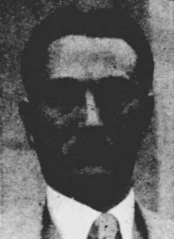 菊池長右衛門（1901～1973）